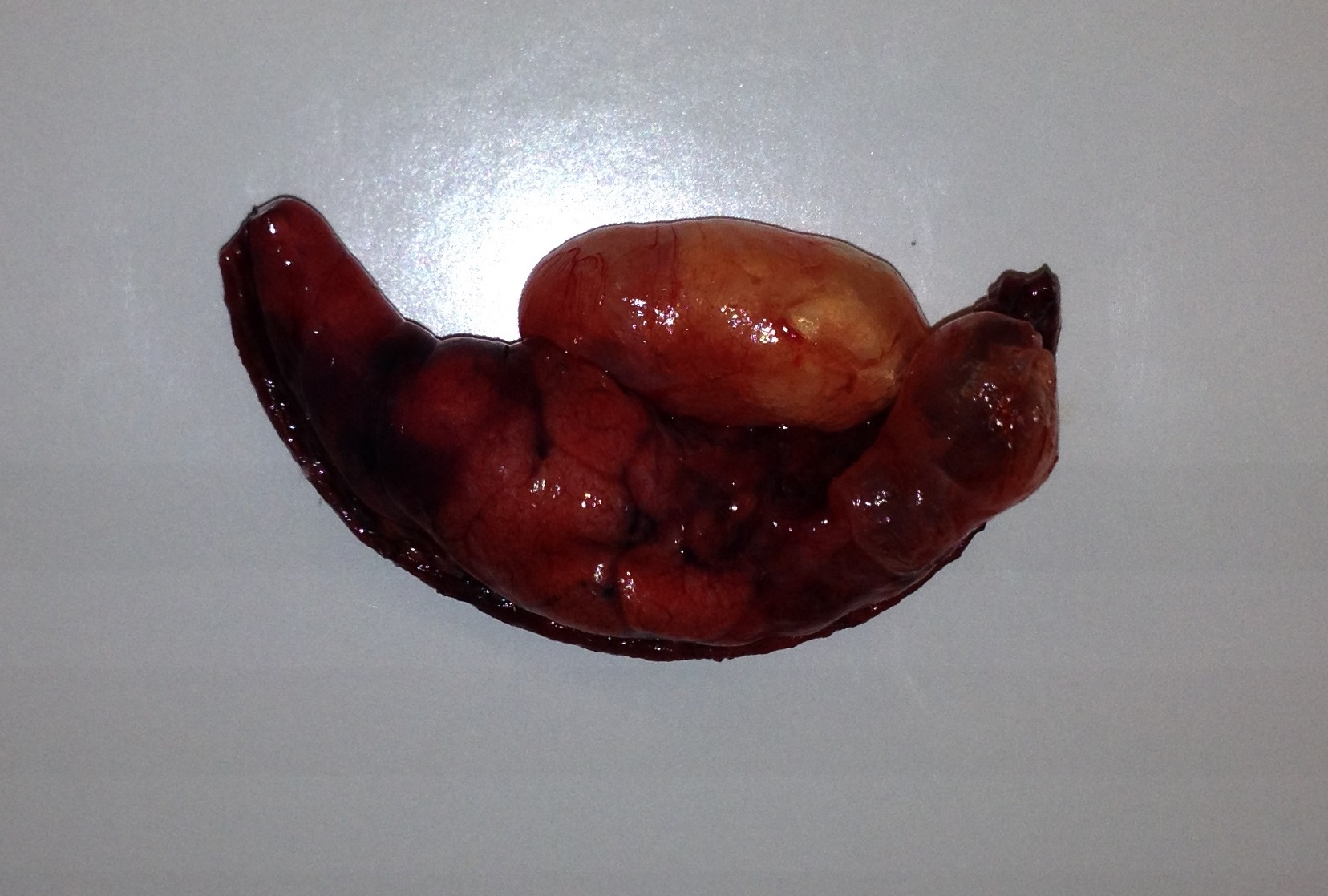 Ressecção de segmento de ápice pulmonar por VATS, com presença de bolha e de vesícula enfisematosa subpleural